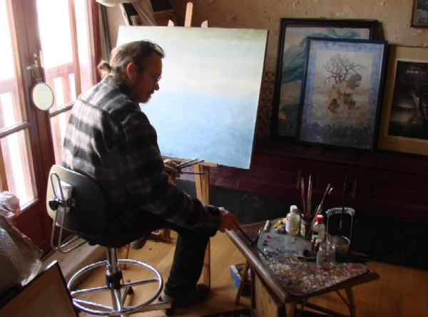 Philippe Legendre-Kvater dans son atelier